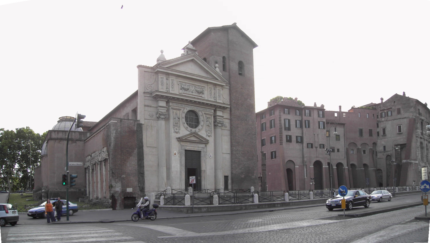 Roma, san Nicola in Carcere al Teatro di Marcello (rione XII Ripa)